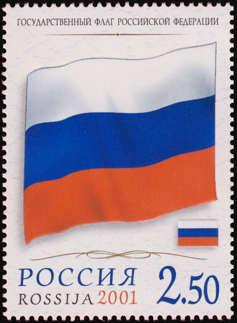 Государственный флаг Российской Федерации.